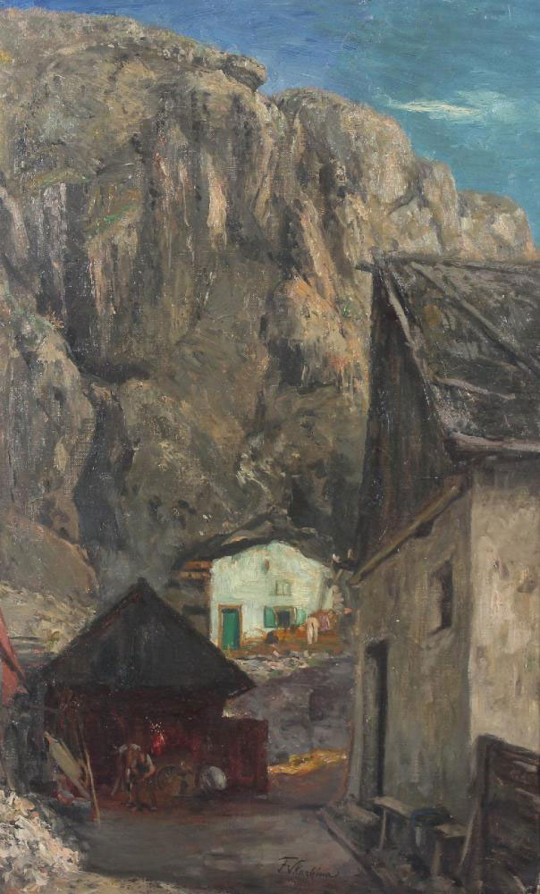 in Kallmünz in der Oberpfalz